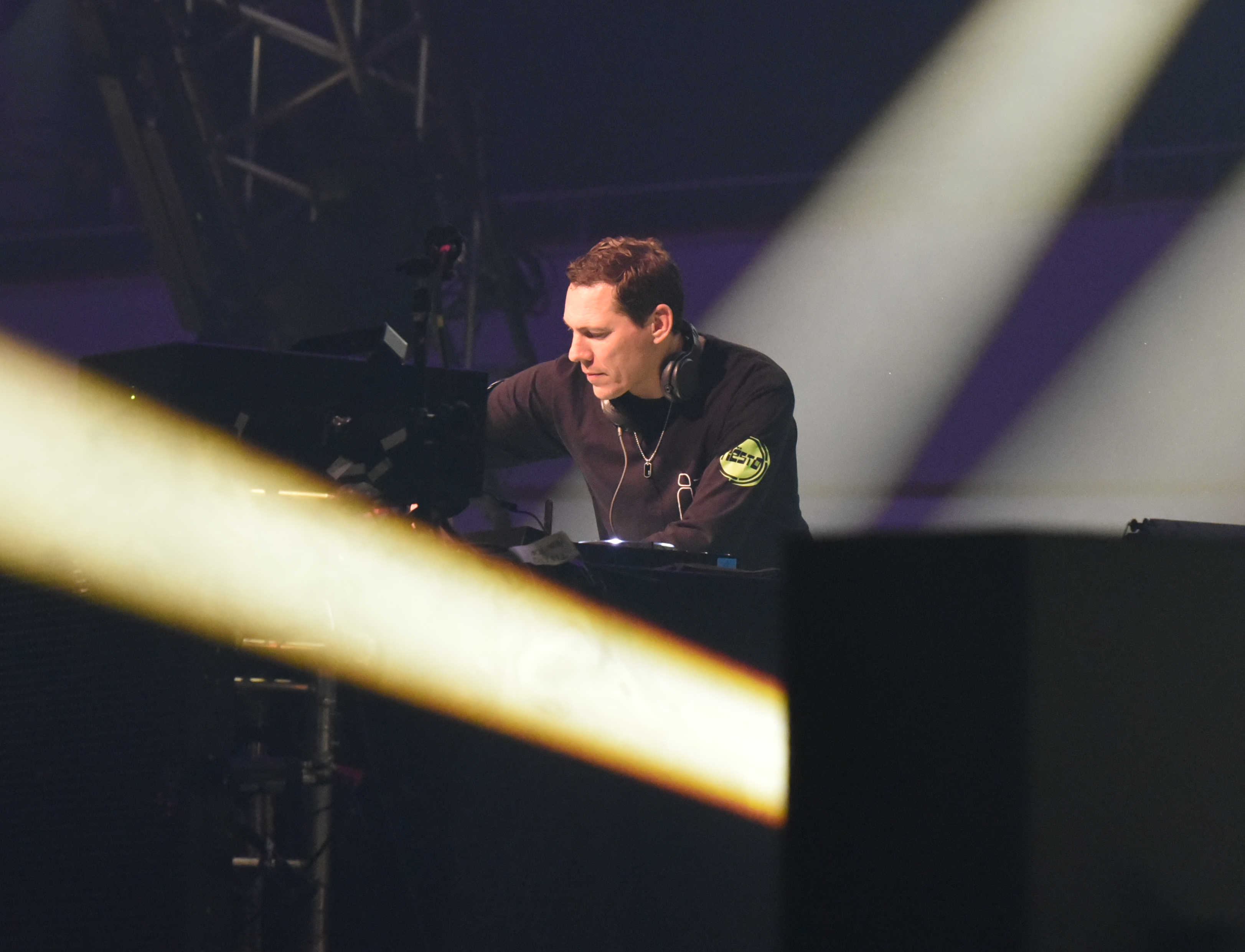 Tiesto @ Mayday 2019